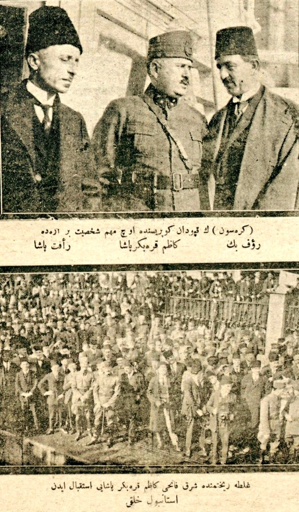 Terakkiperver Cumhuriyet Fırkası